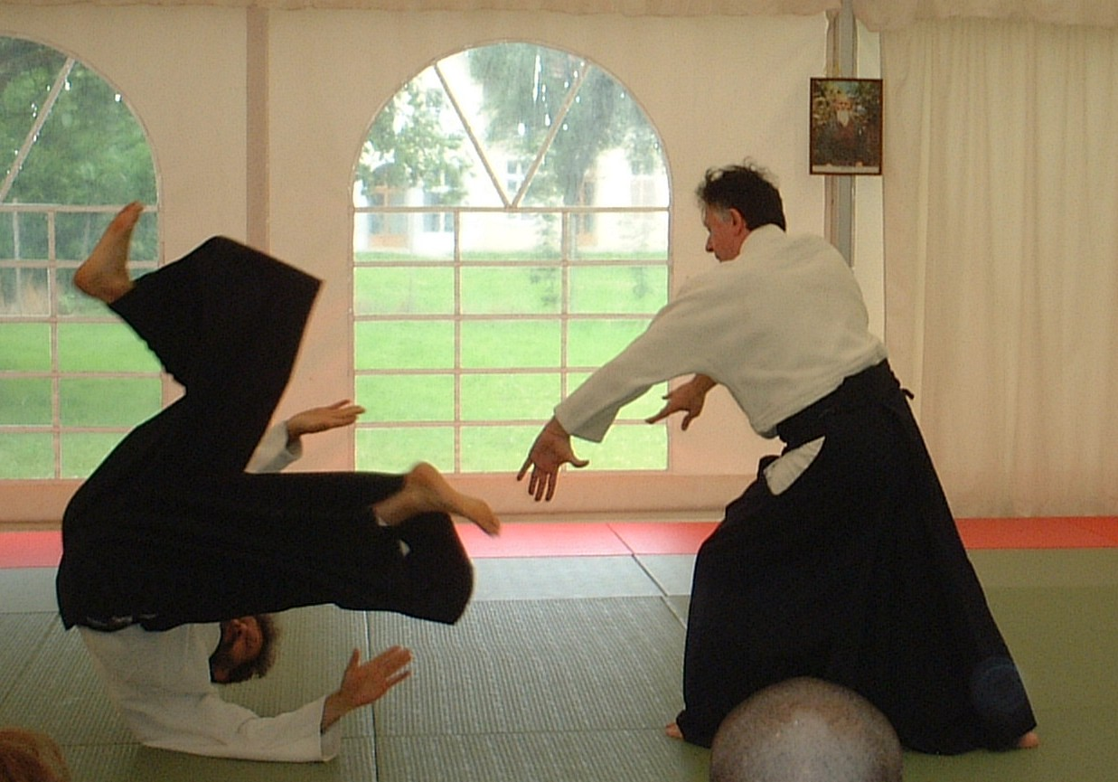 Gérard Blaize exécutant la technique kokyu nage - juillet 2002 - Château de Clairvans, Chamblai, Jura, France.